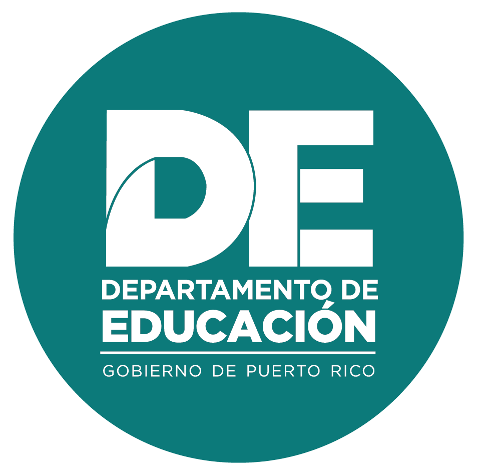 LOGO DE